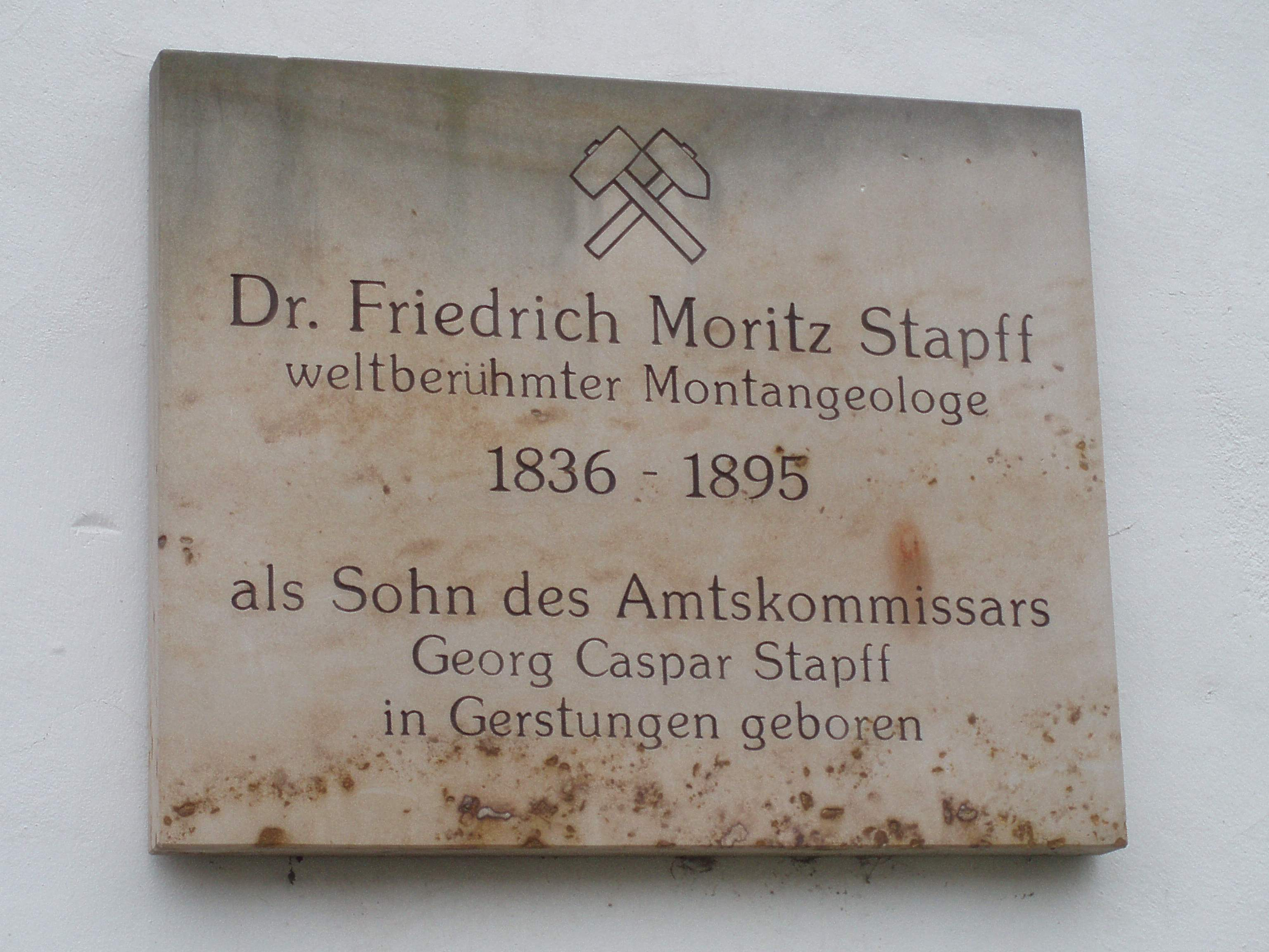 Stapff-Tafel in Gerstungen